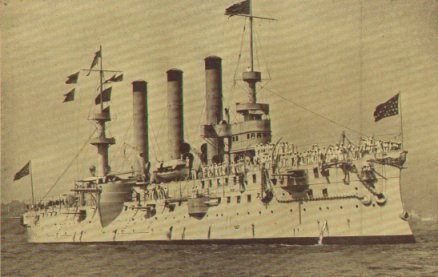 USS Brooklyn (CA-3)